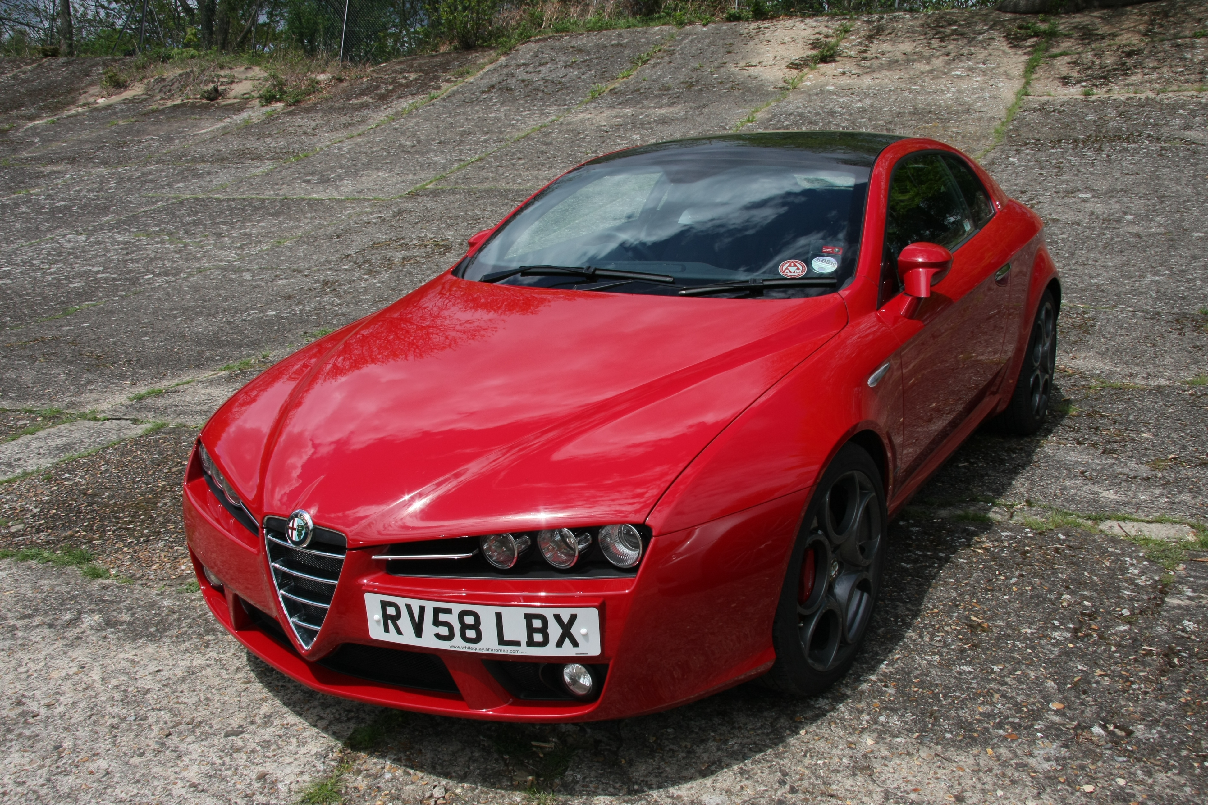 Auto Italia Italian Car Day Brooklands May 2010